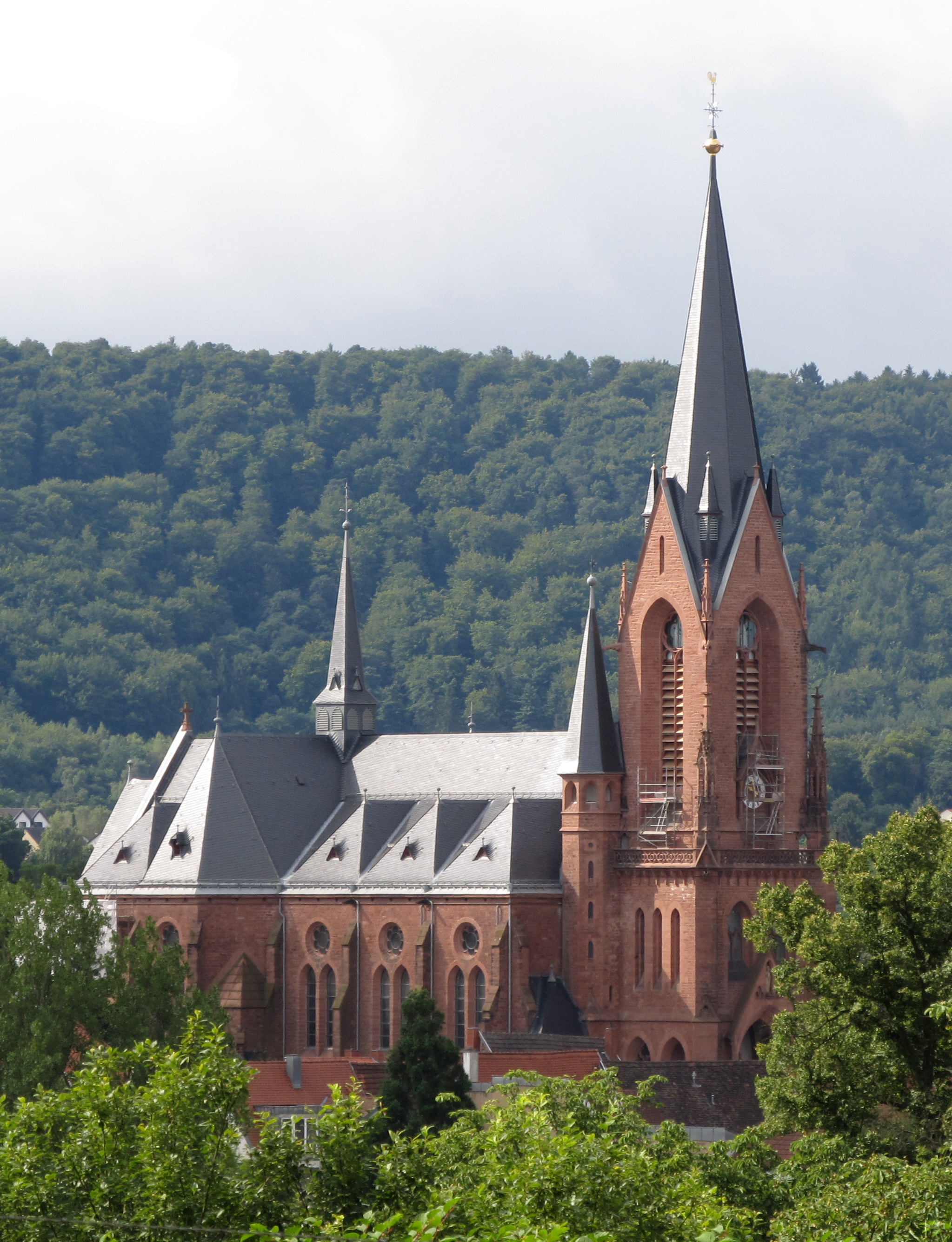 Blick auf die St. Josefskirche in St. Ingbert, Saarland